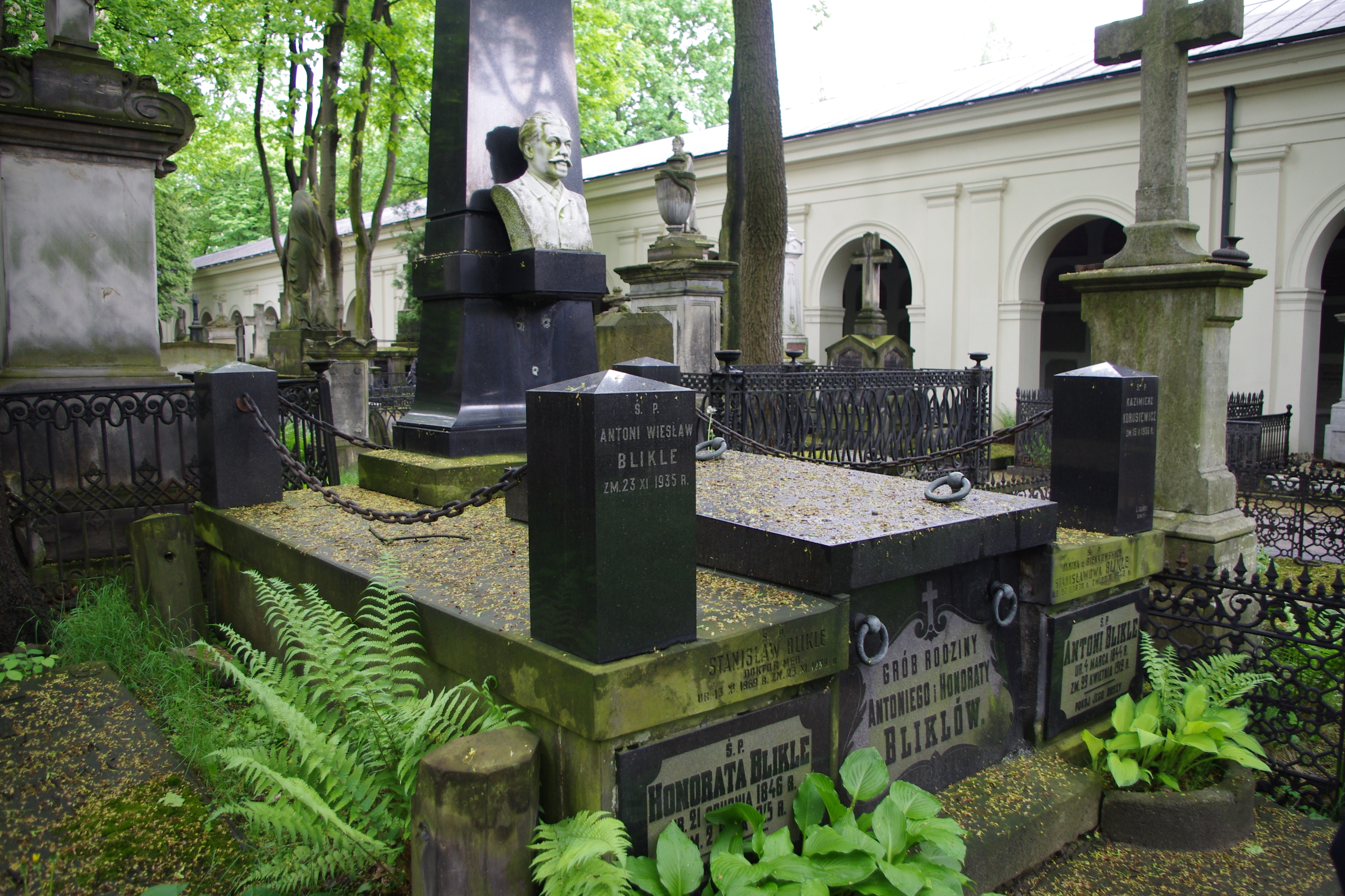 Grób przemysłowca Antoniego Kazimierza Blikle na Starych Powązkach w Warszawie